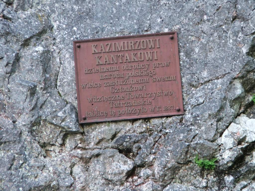 Brama Kantaka (Dolina Kościeliska)